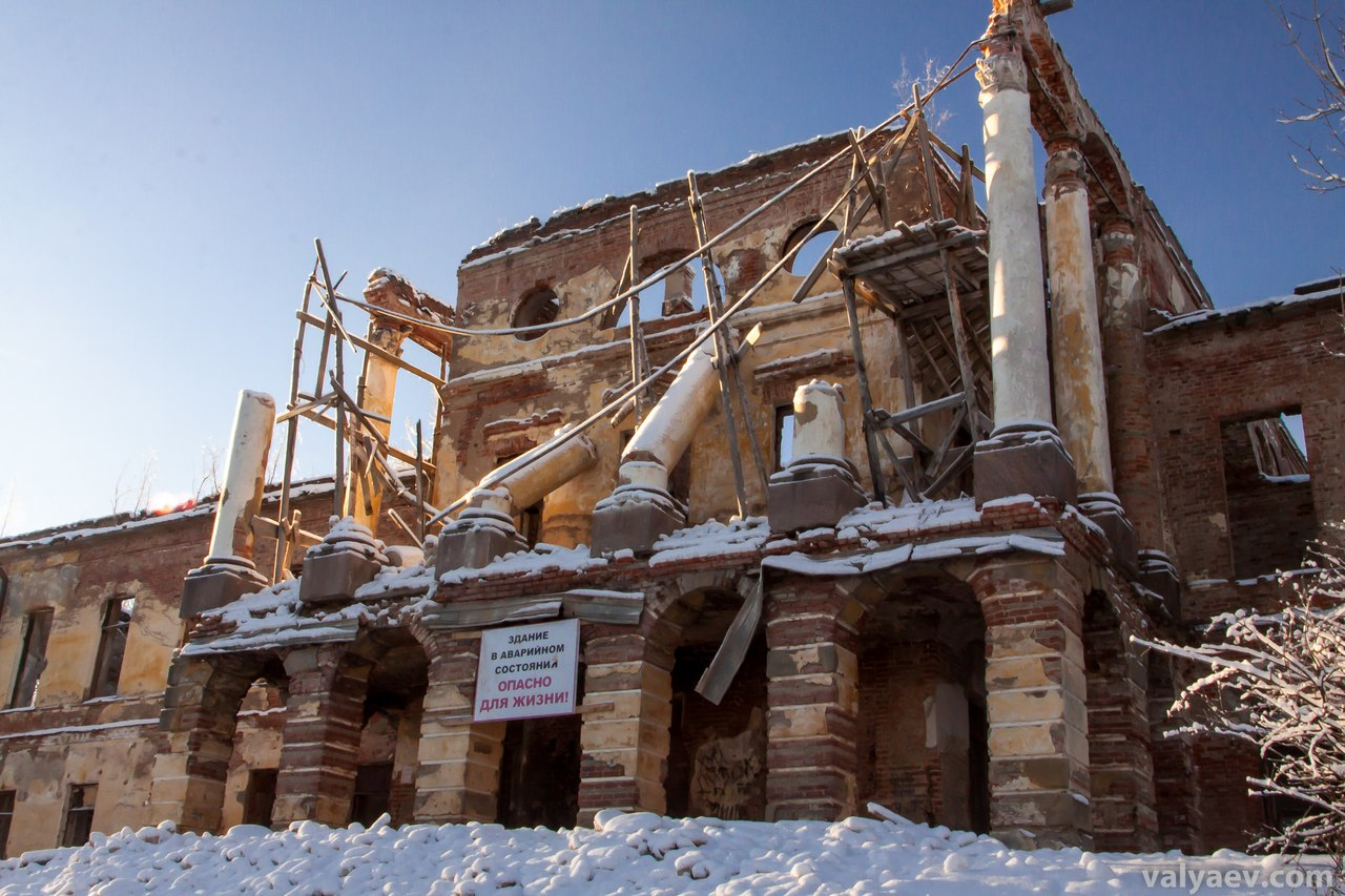 Портик рухнул 7 января 2015 года